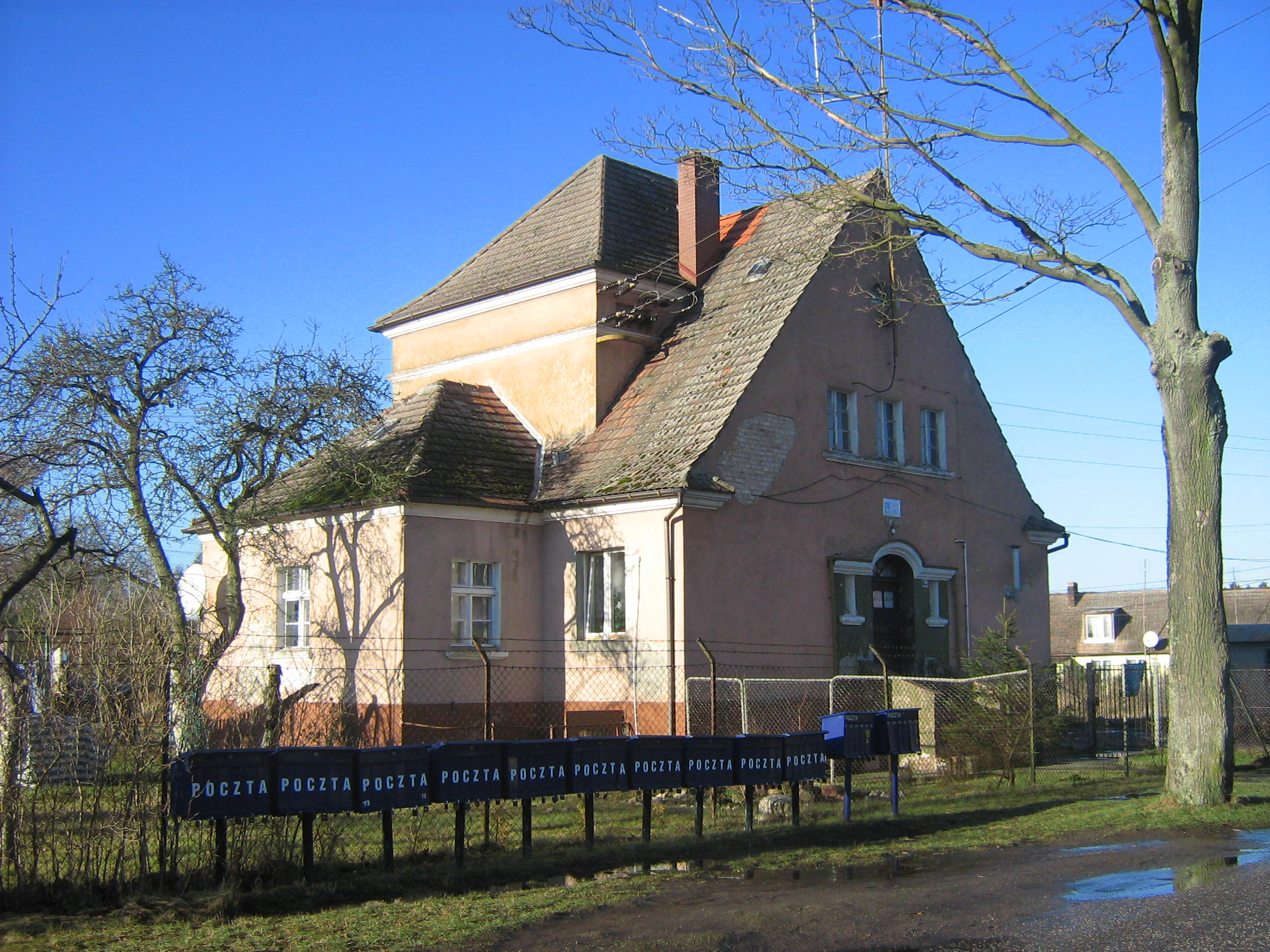 Zabytkowy dom o numerze 15 w Kodrąbku